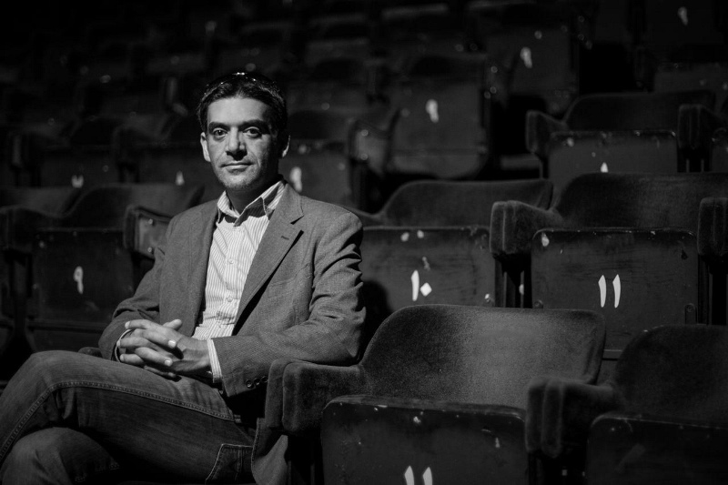 روح الله جعفری در تالار چهارسو